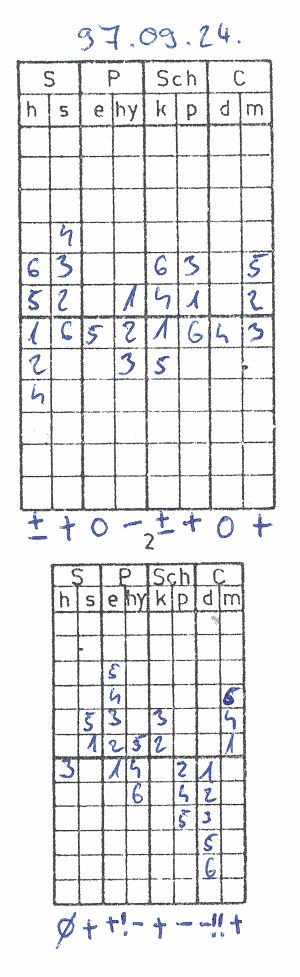 Szondi-teszt, saját tesztfelvétel, a vsz. engedélyével